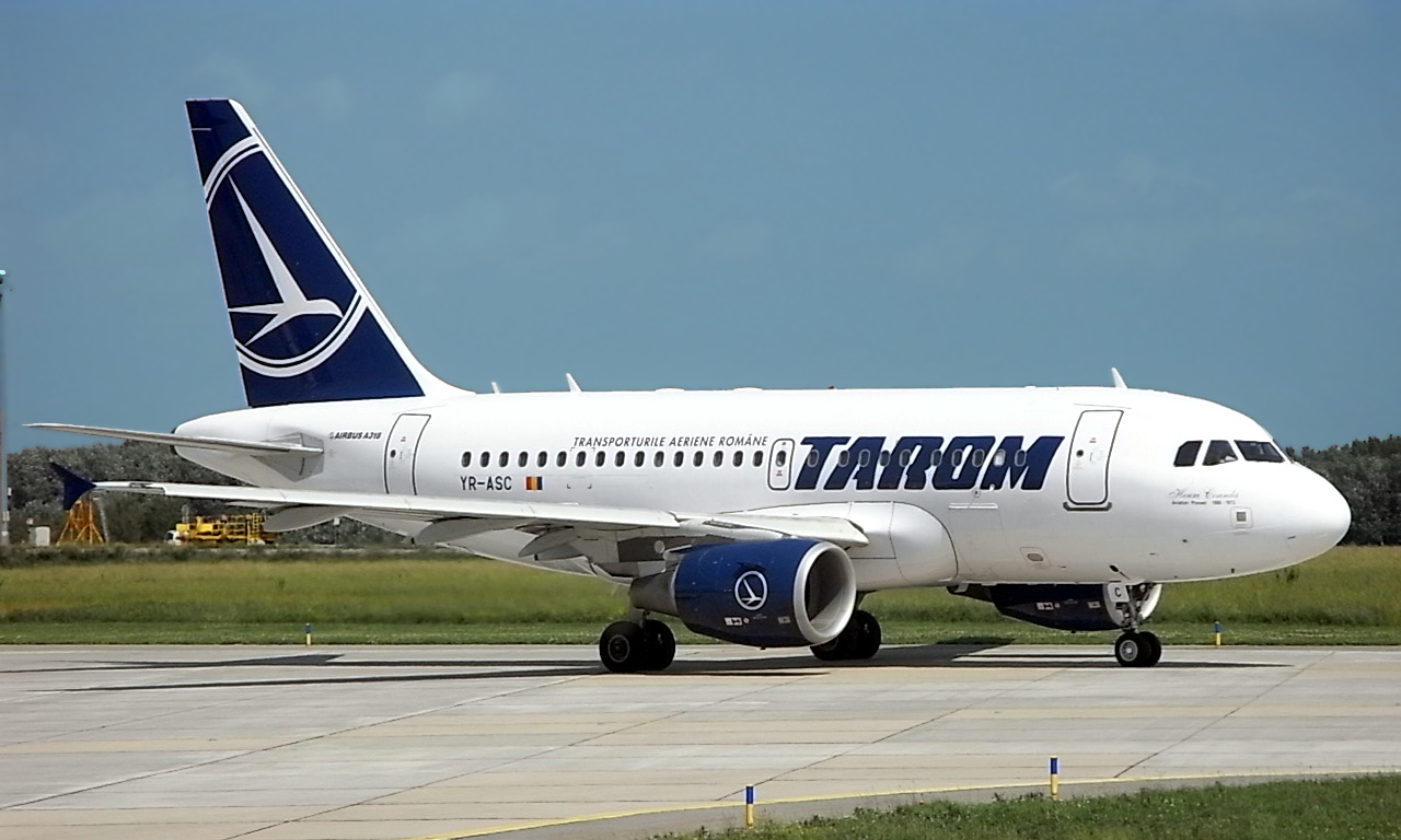 Airbus 318 der TAROM in Wien-Schwechat.